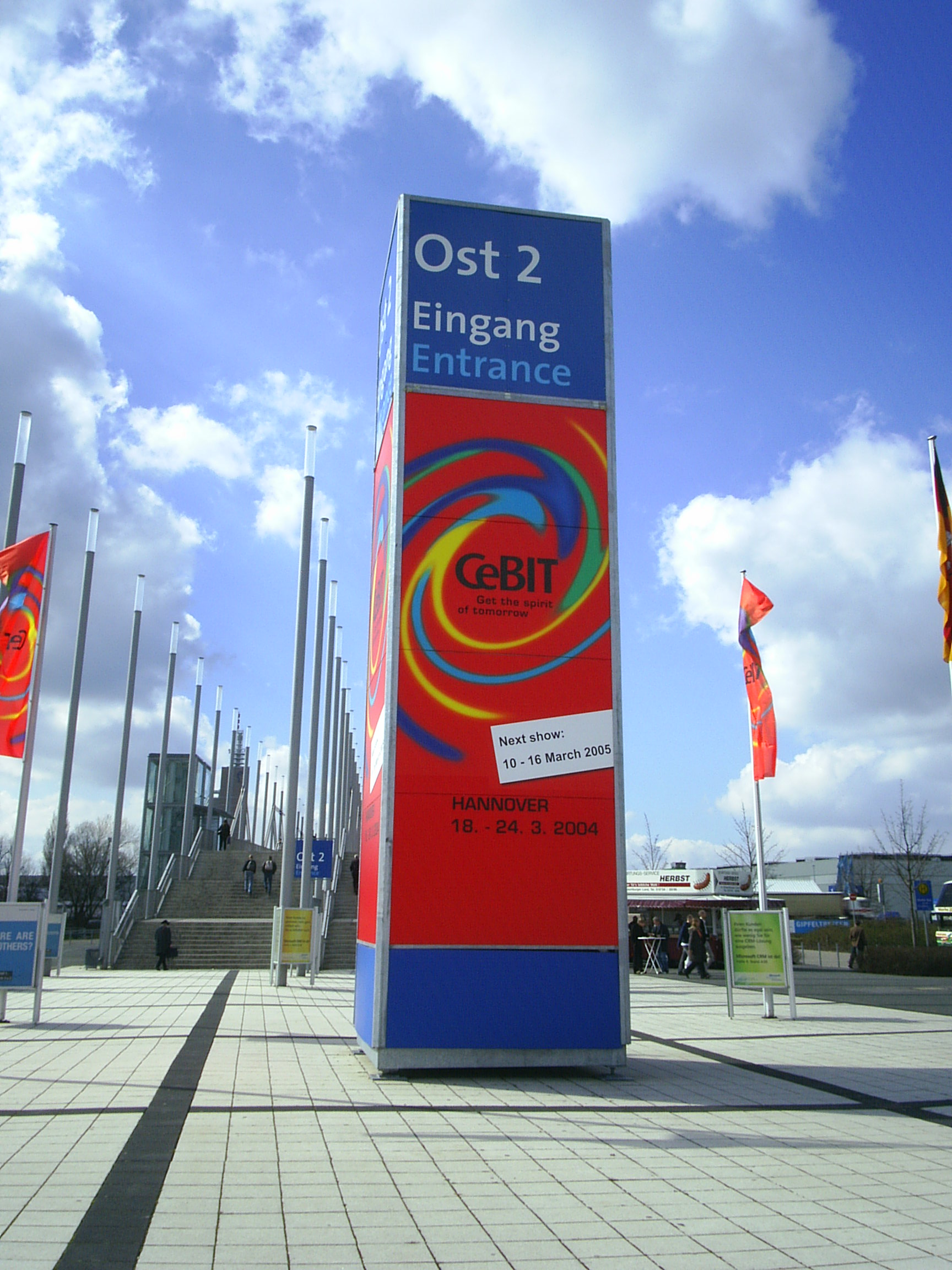 Beschreibung: Auf dem Bild ist ein Schild vorm Eingang Ost der Cebit 2004 in Hannover zu sehen. Datum: Fotografiert: 20.03.04 Hochgeladen: 28.12.05 Fotograf: Johannes Niehuis